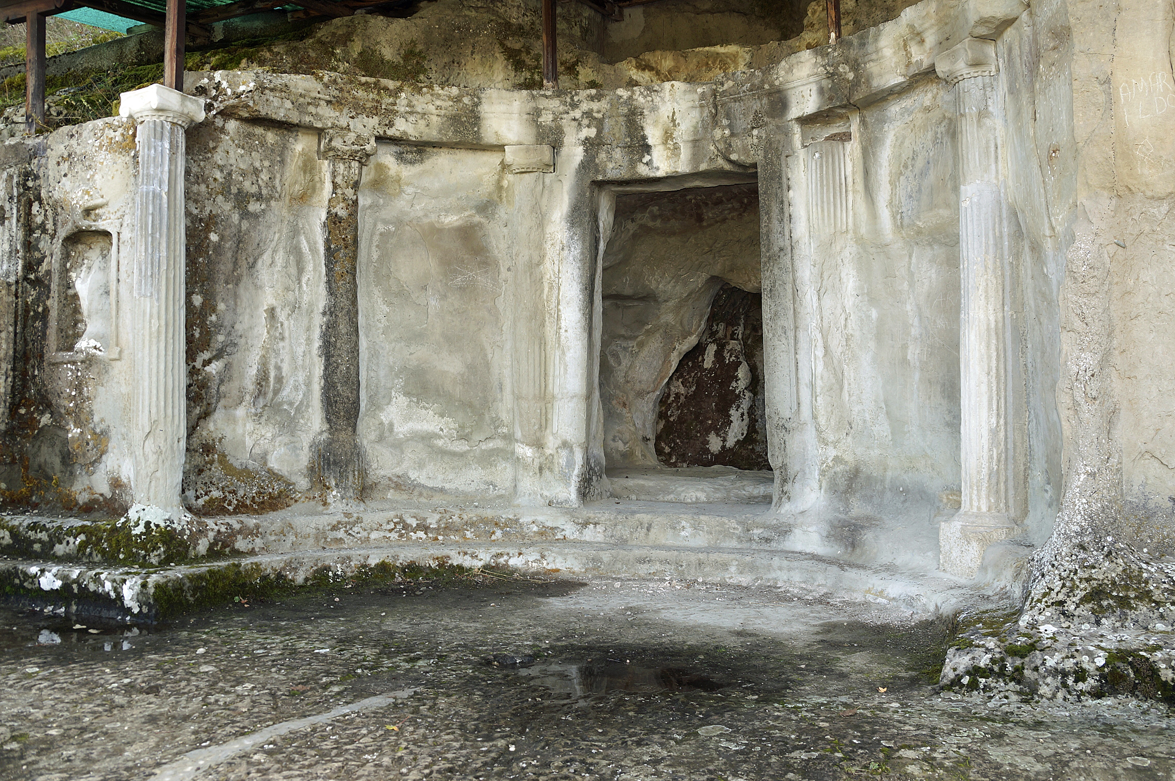 Selca e Poshtmë, Albania: apparent grave of tomb 3